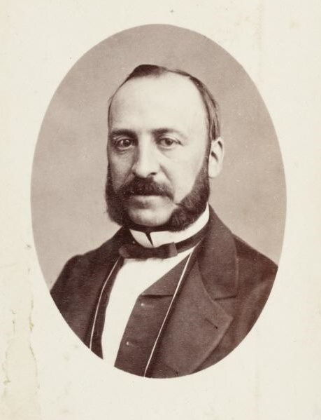 Antonio Jesús de Santiago, fotografía de J. Laurent, Museo de Historia de Madrid